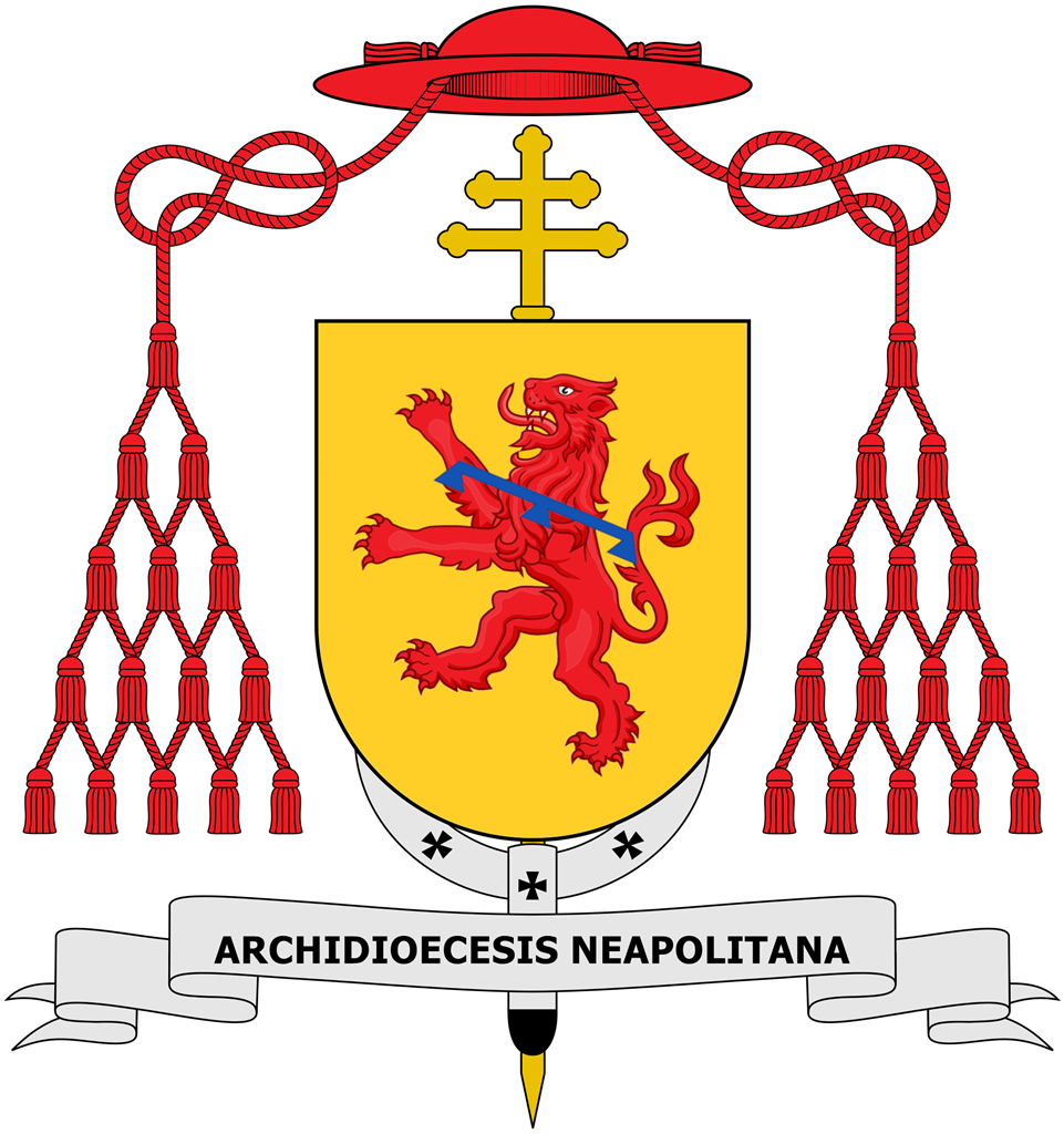 Stemma della famiglia Cantelmo, utilizzato da Giacomo Cantelmo, arcivescovo metropolita di Napoli.